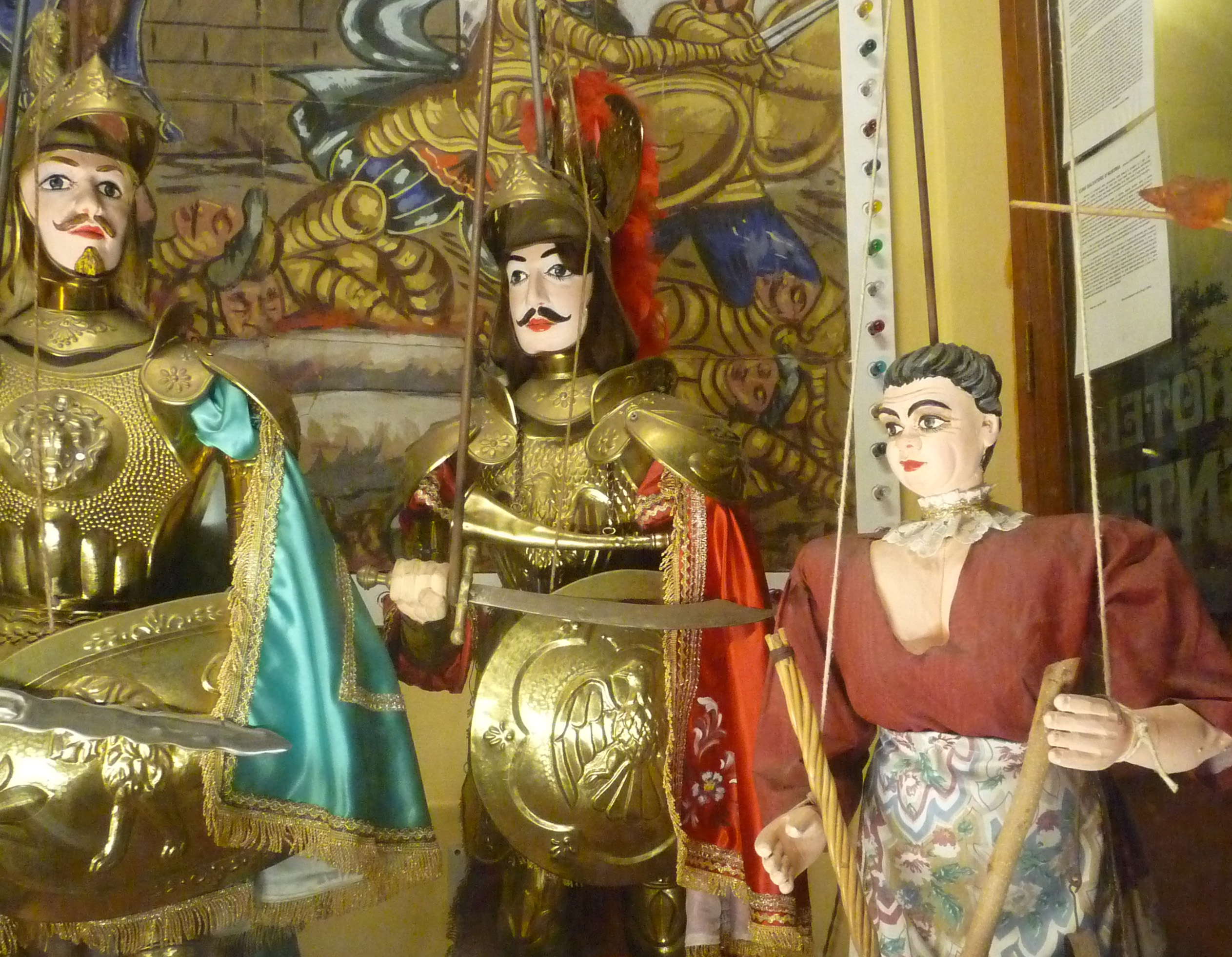 Personnages du théâtre de marionnettes sicilien (Musée ethnographique éolien, Lipari). Rinaldo, Orlando et Lauretta (?)